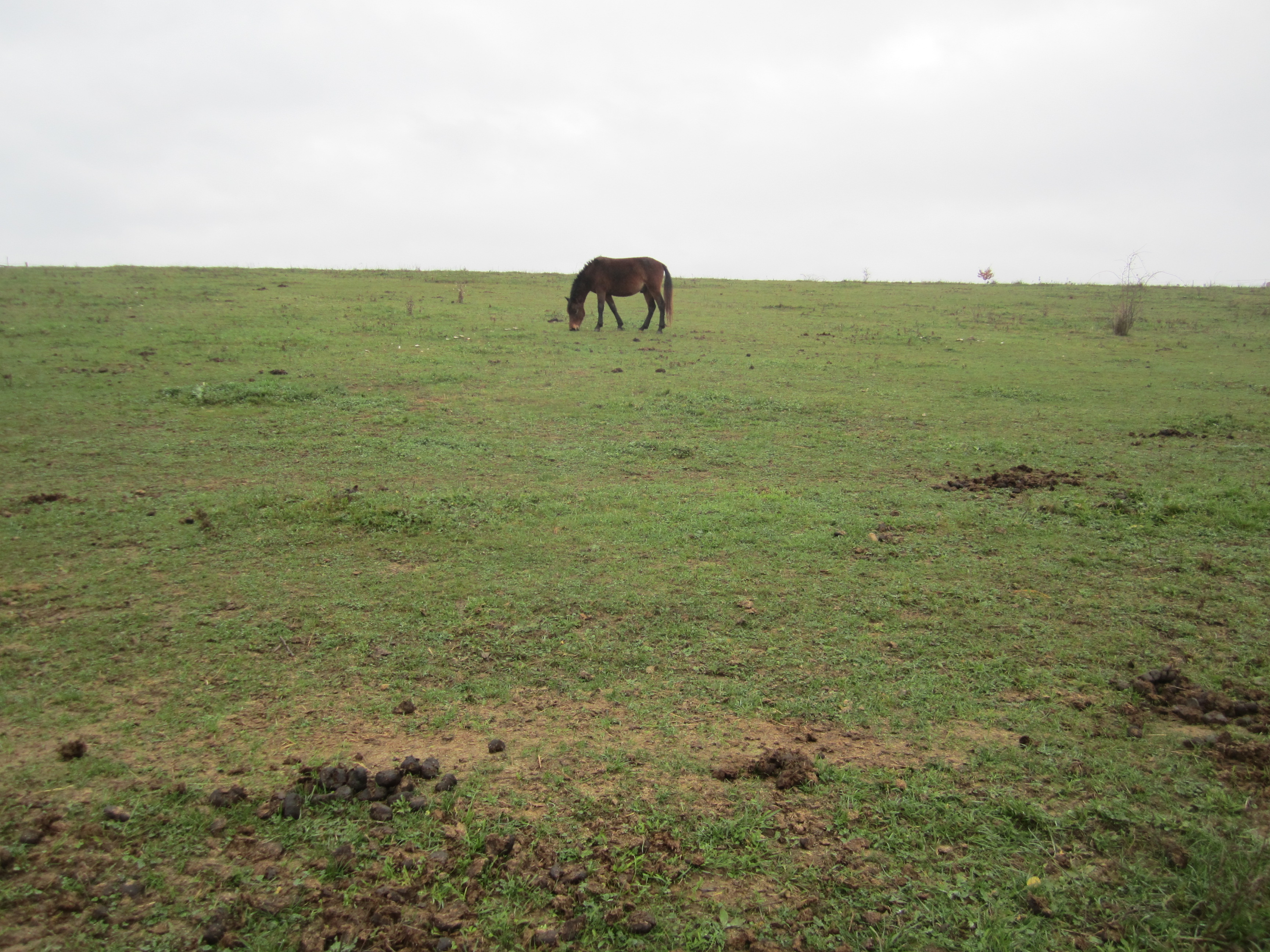 Teplomilná pastvina